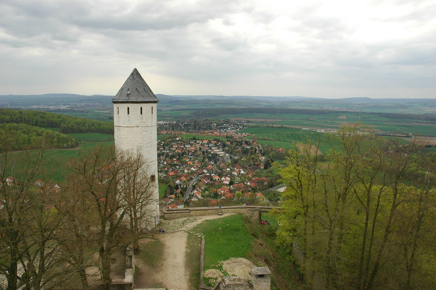 Blick vom Plesseturm auf Eddigehausen und ins Leinetal